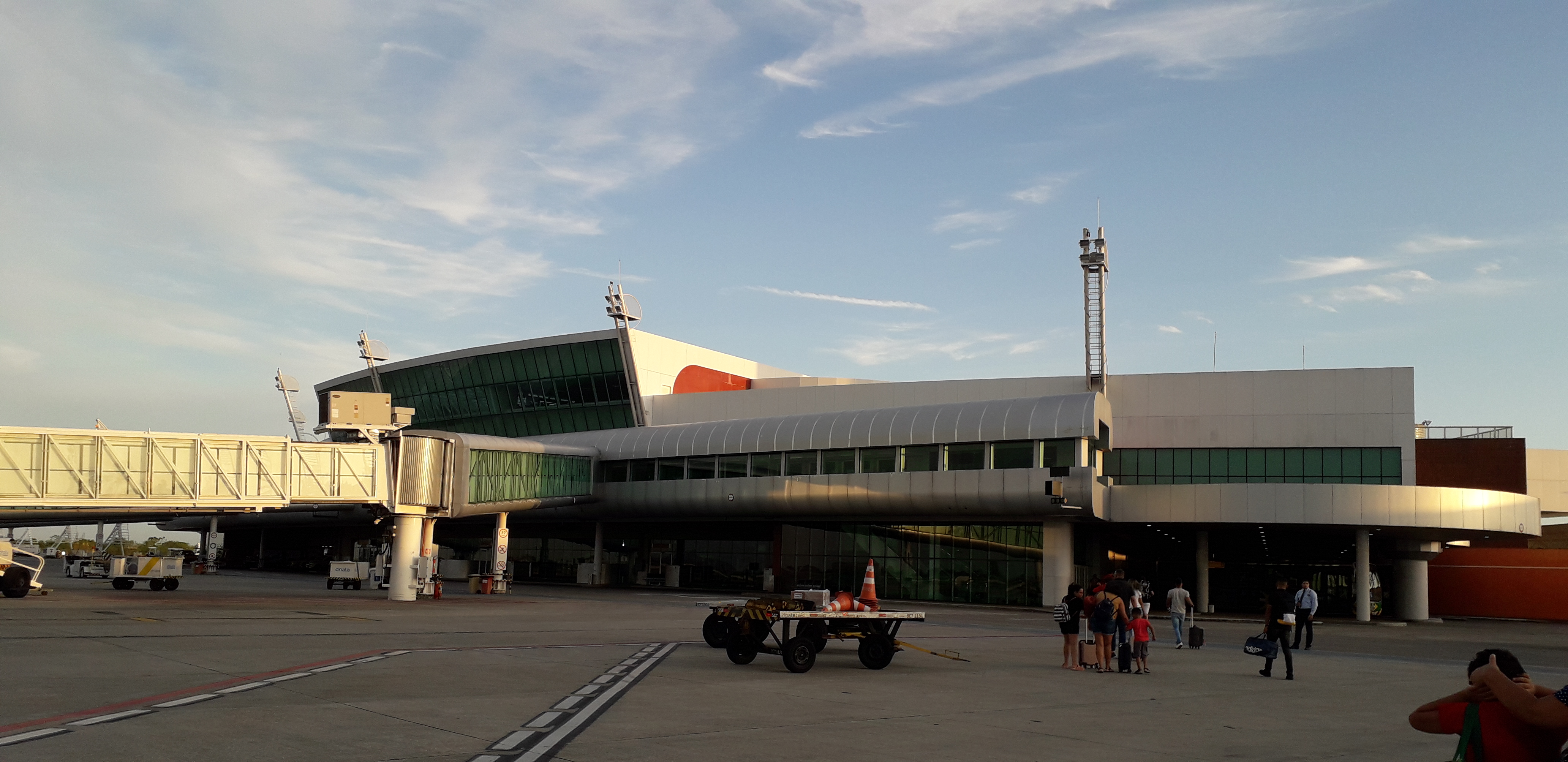 Vista do aeroporto Zumbi dos Palmares à partir da pista de pouso